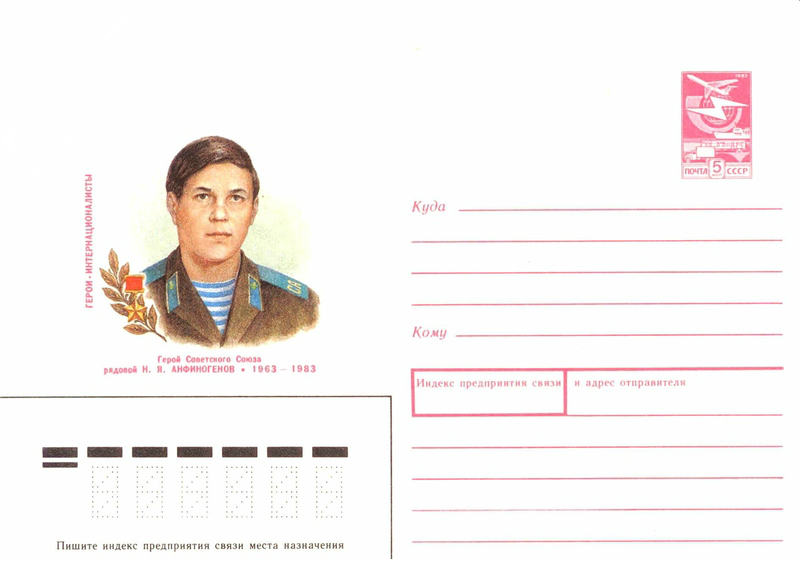 Анфиногенов Николай Яковлевич. Разведчик. Первый рядовой боец, удостоенный звания Героя Советского Союза за участие в Афганской войне 1963 - 1983. Номер по каталогу 89-081